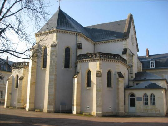 Le corps de Sainte-Bernadette repose depuis 1925 à l'intérieur d'une châsse, dans cette chapelle de Saint-Gildard, à Nevers.